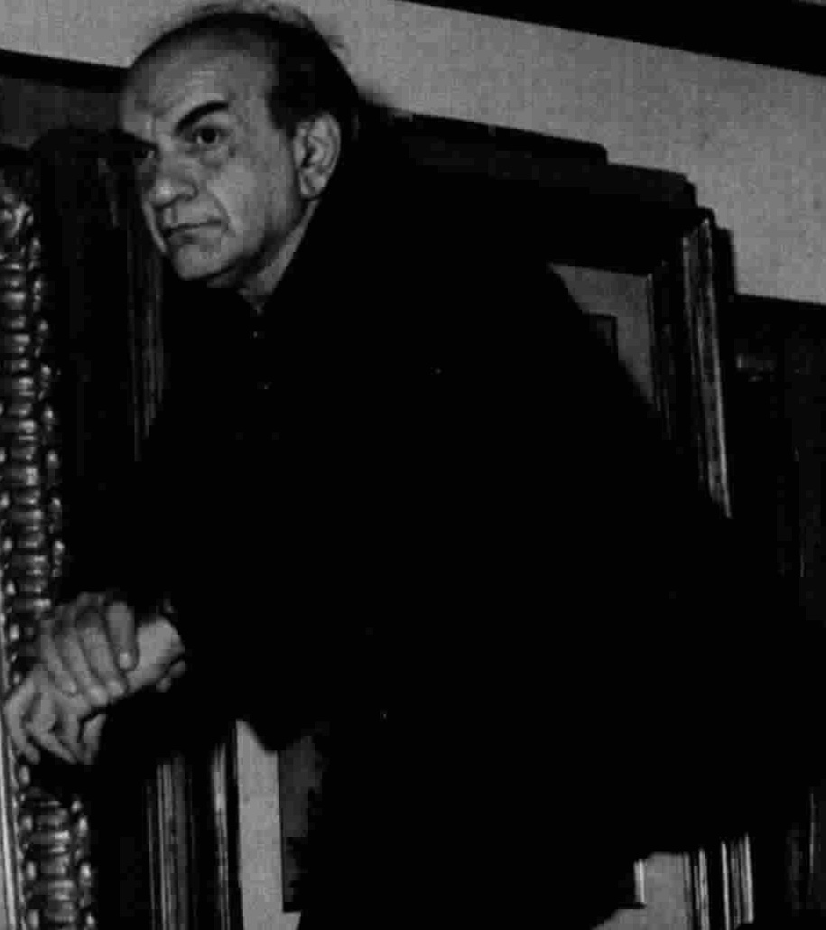 Italian painter Corrado Cagli at his studio in Rome